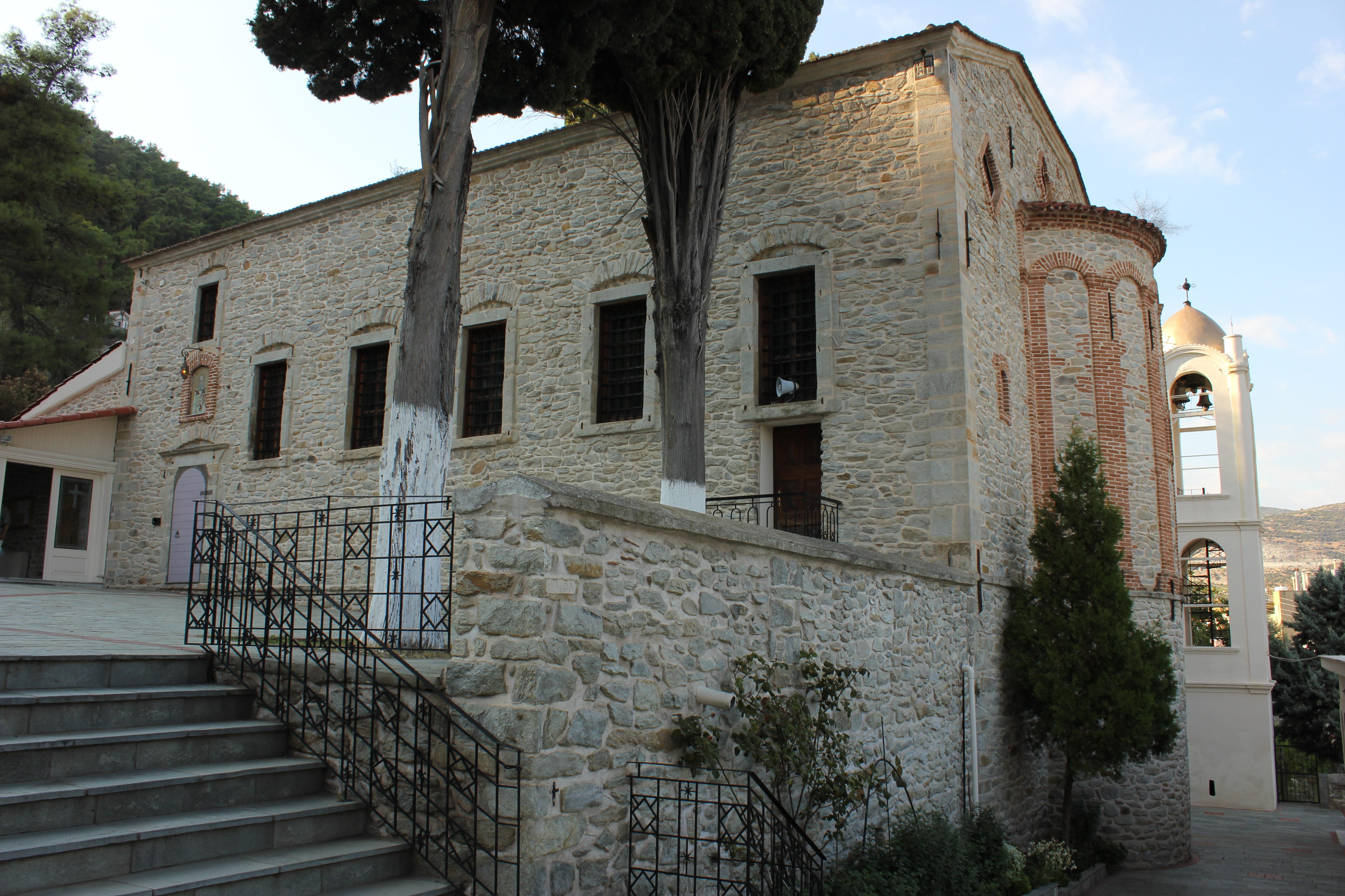 Църква „Свети Атанасий“, Кавала